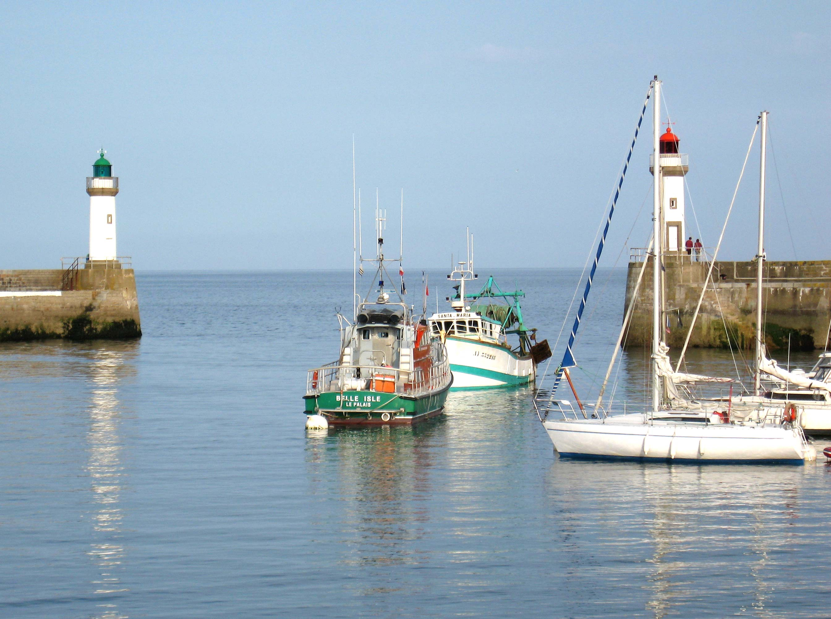 Phares du port du Palais à Belle Ile, Bretagne, France Lieu : Le Palais, Belle Ile , Bretagne, France Date : mai 2006 Auteur : Pline